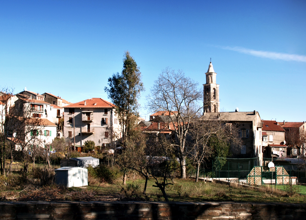 Vezzani (Corse) - Vue du centre du village